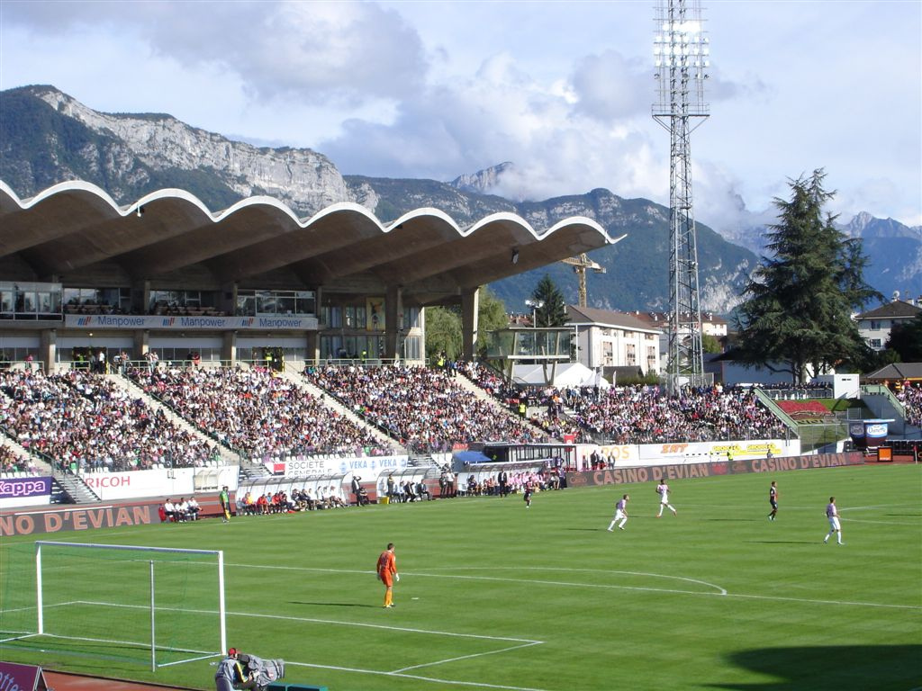 Le terrain et la tribune Manpower du Parc des Sports d'Annecy (Haute-Savoie, France) lors du match de football (ligue 1) Thonon-Gaillard FC/Paris-Saint-Germain ( 2-2) le 18 septembre 2011.